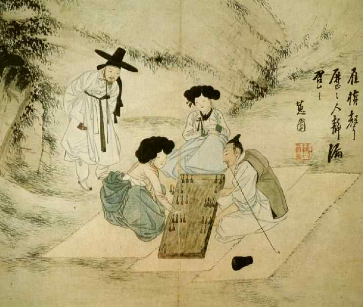 쌍육삼매(雙六三昧) '혜원풍속도첩 (蕙園風俗圖帖)' 중에서, 서울 성북구 간송미술관 소장. 기생들을 데리고 야외에서 쌍육놀이를 하는 모습을 그렸다.